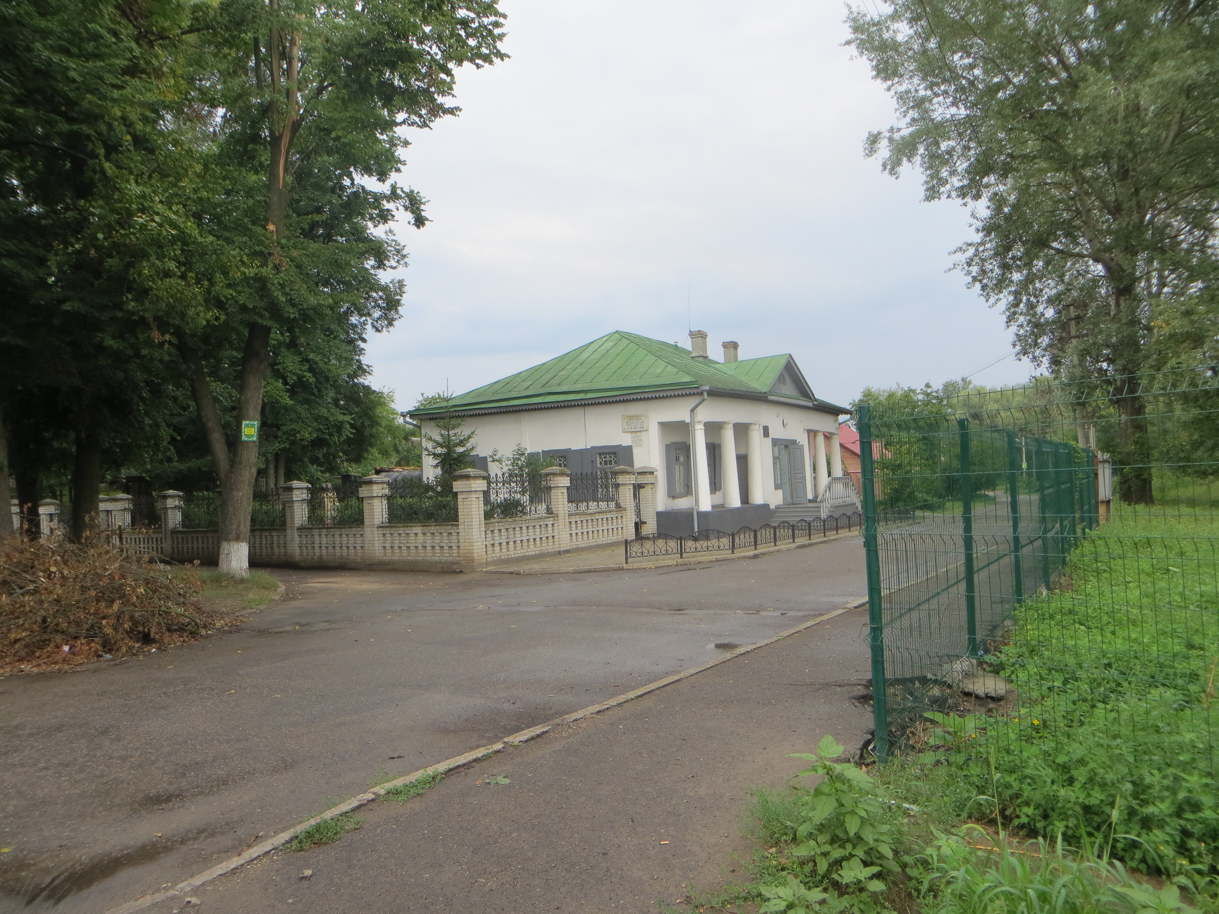 Флігель Чехова в маєтку Лука (Суми)